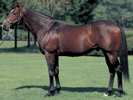 トニービンの写真